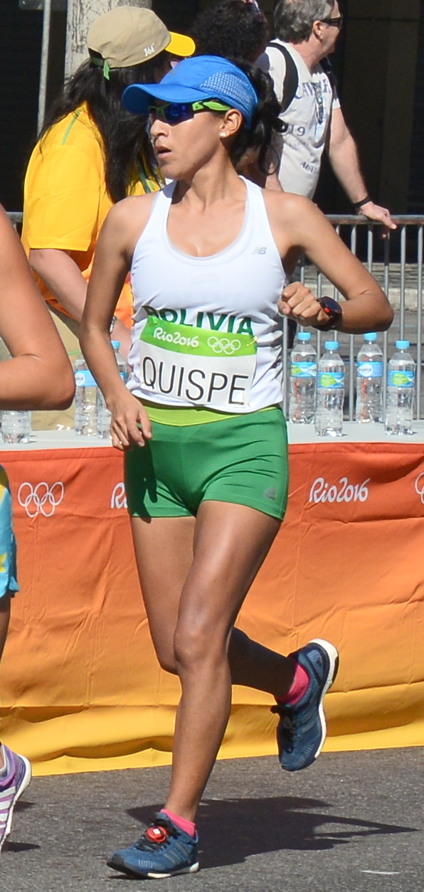 Passage du marathon des jeux olympiques de Rio 2016 dans le centre de Rio